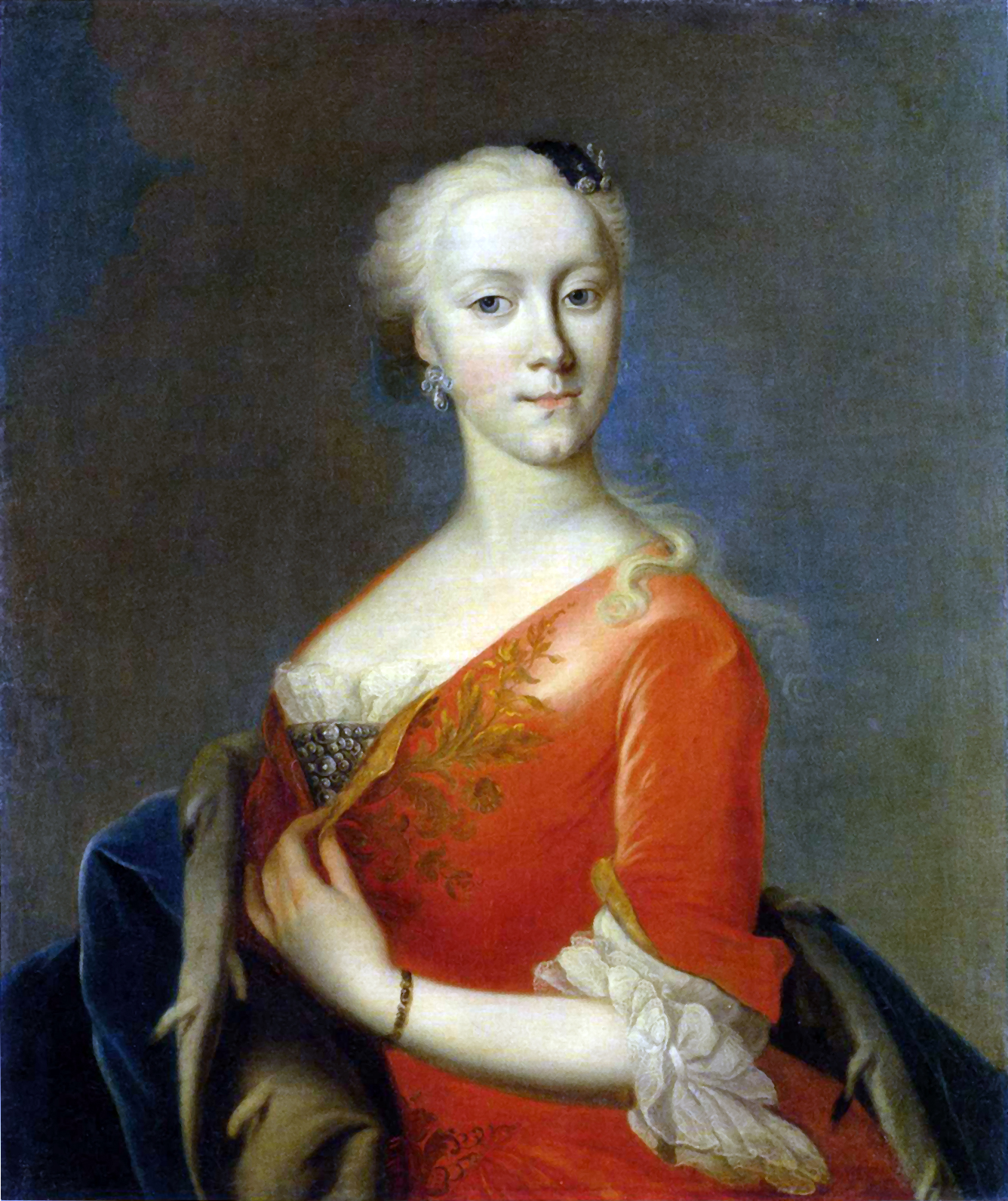 Herzogin Philippine Charlotte von Braunschweig (1716-1801)